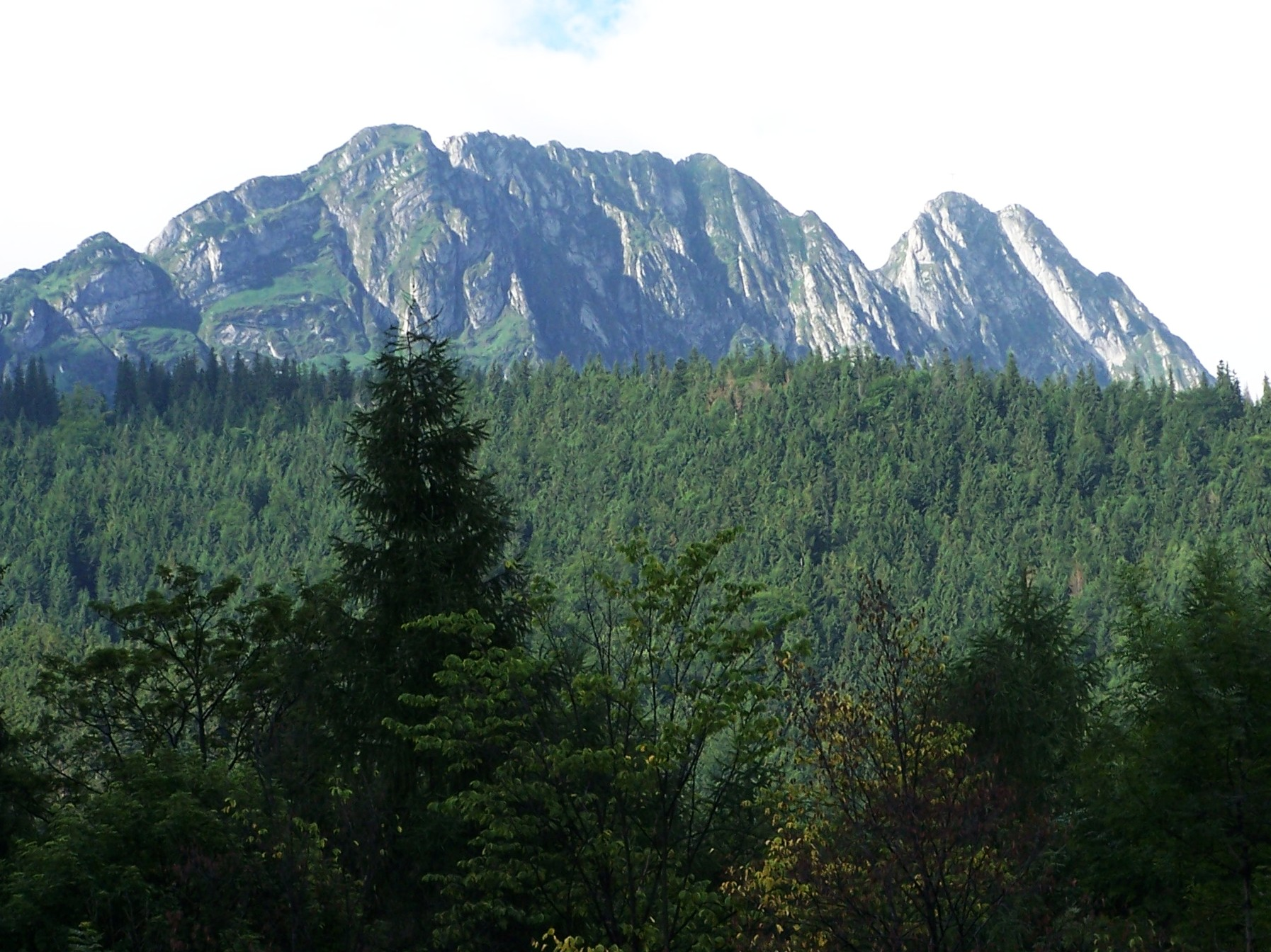 Giewont - widok z Zakopanego